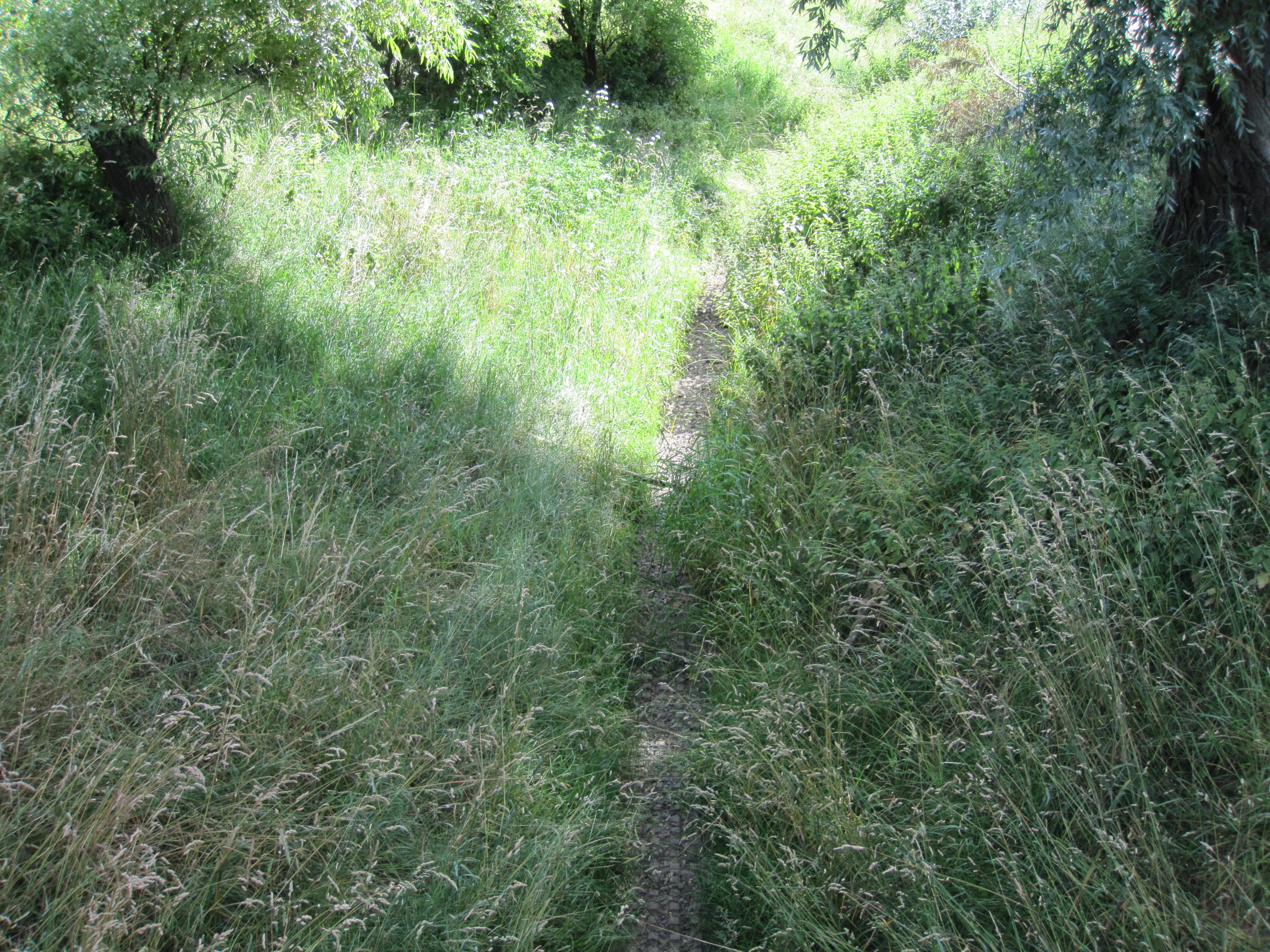 Vilicher Bach in der Nähe der Kläranlage Beuel. Zu Zeit der Aufnahme trockengefallen.